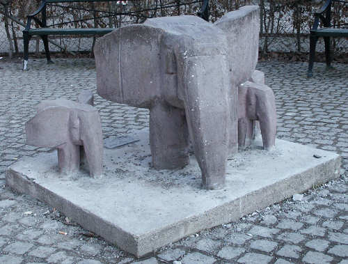 Lilla elefanten drömmer by Torsten Renqvist, Stockholm, Sweden.